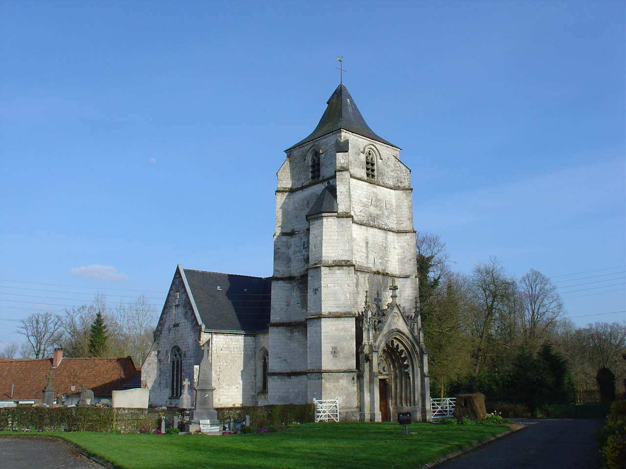 Église de Tramecourt